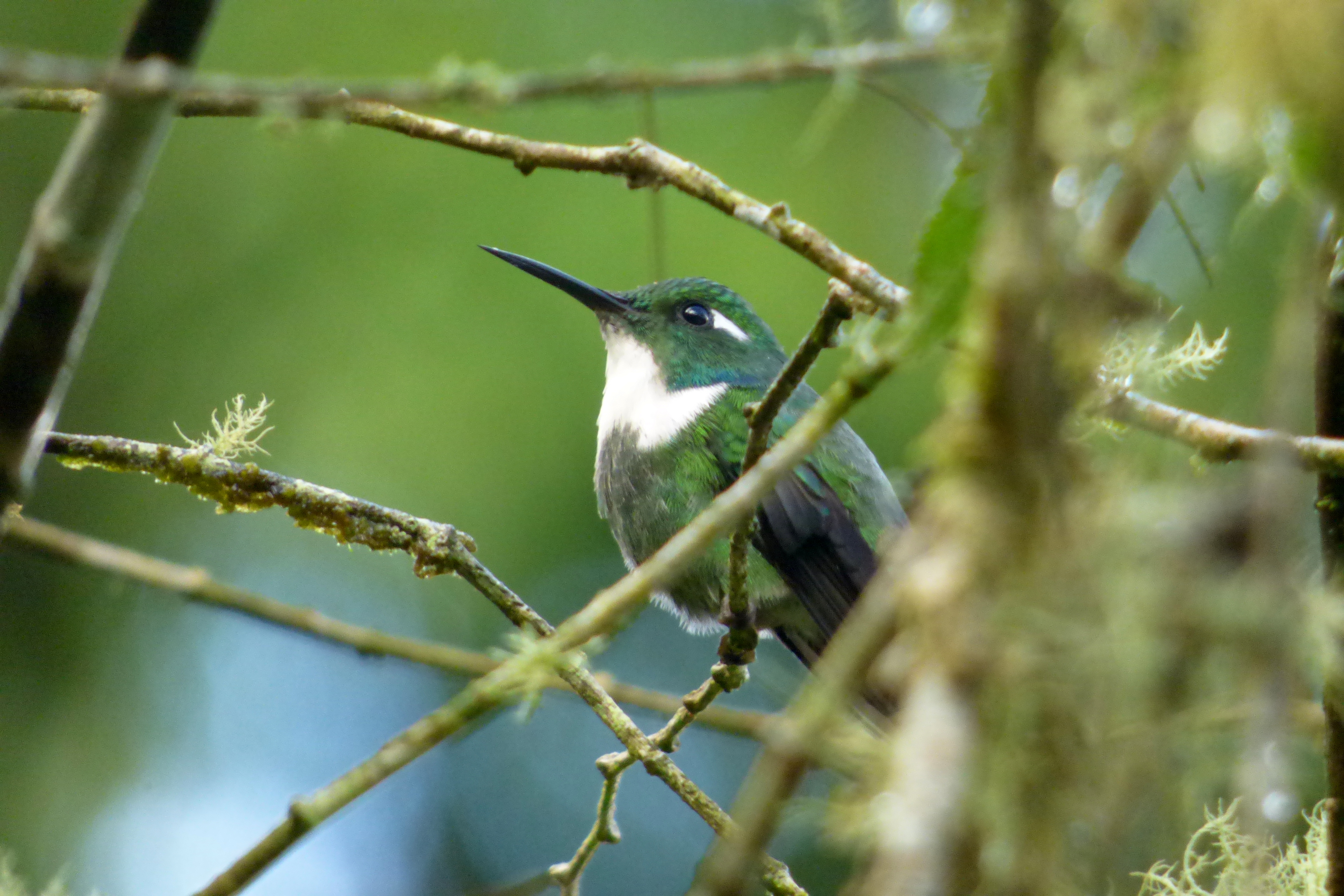 Schistes geoffroyi (Pico de cuña)